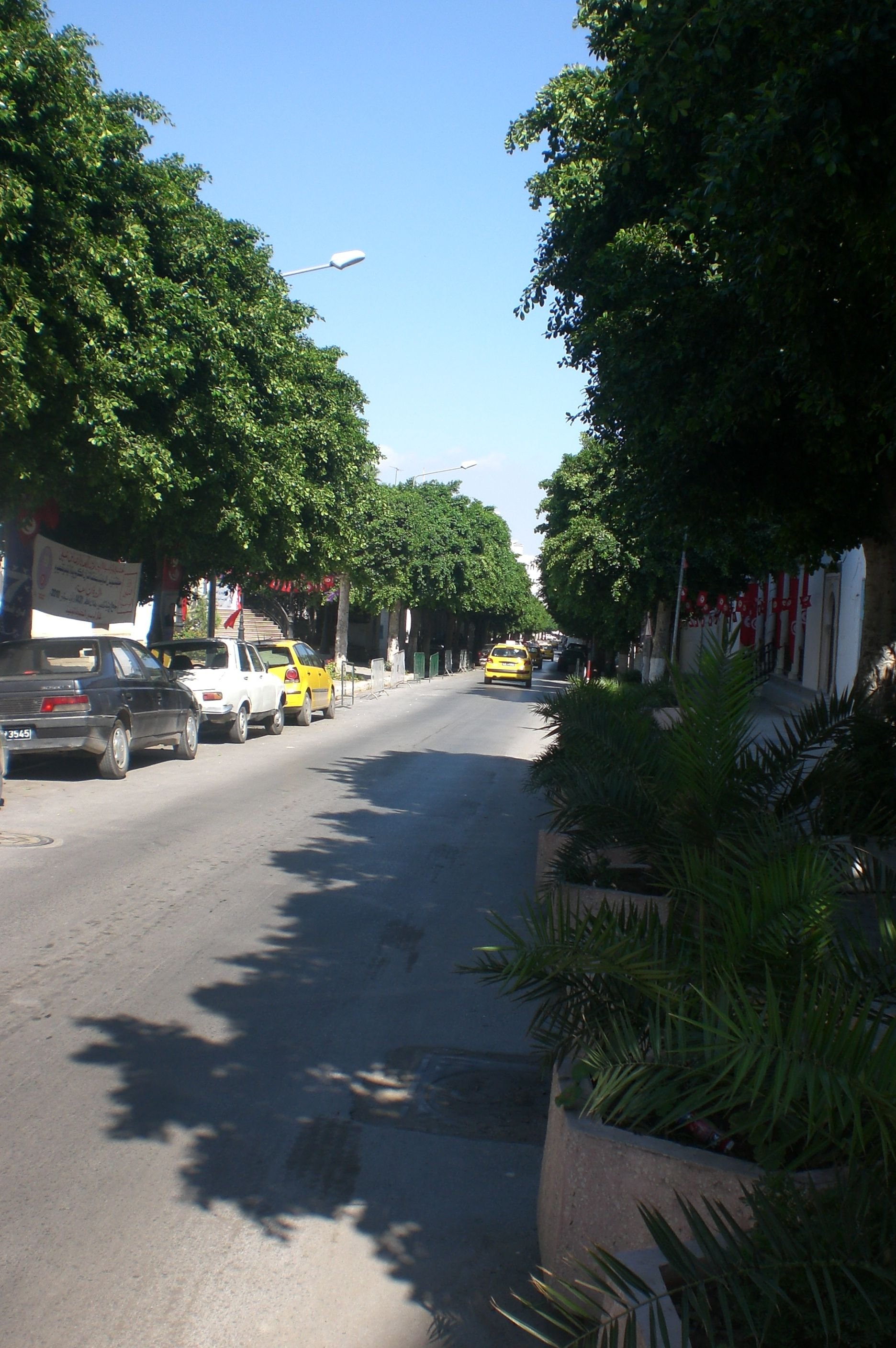 Rue Bab Bnet-Tunis